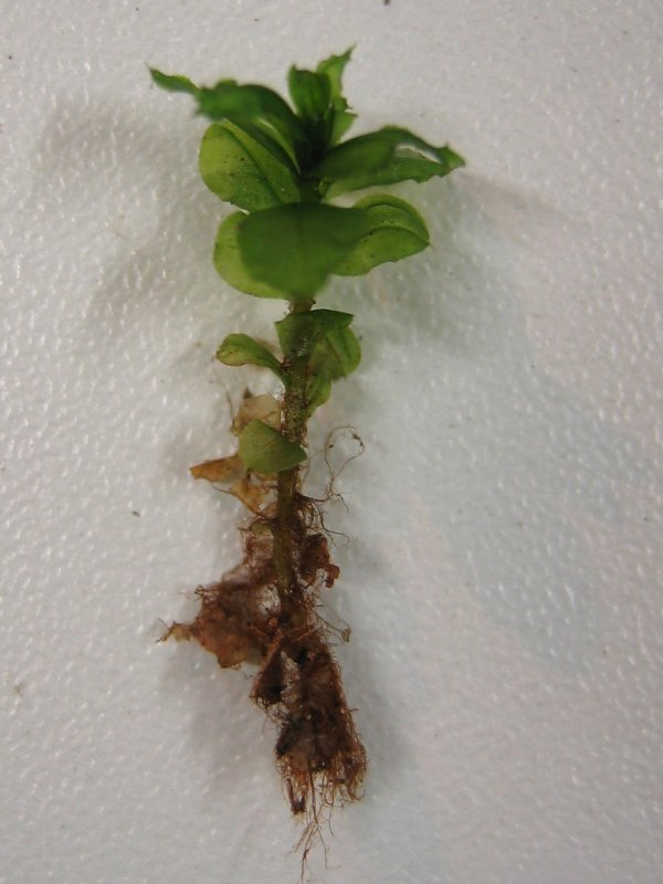 Plagiomnium affine, Rostock